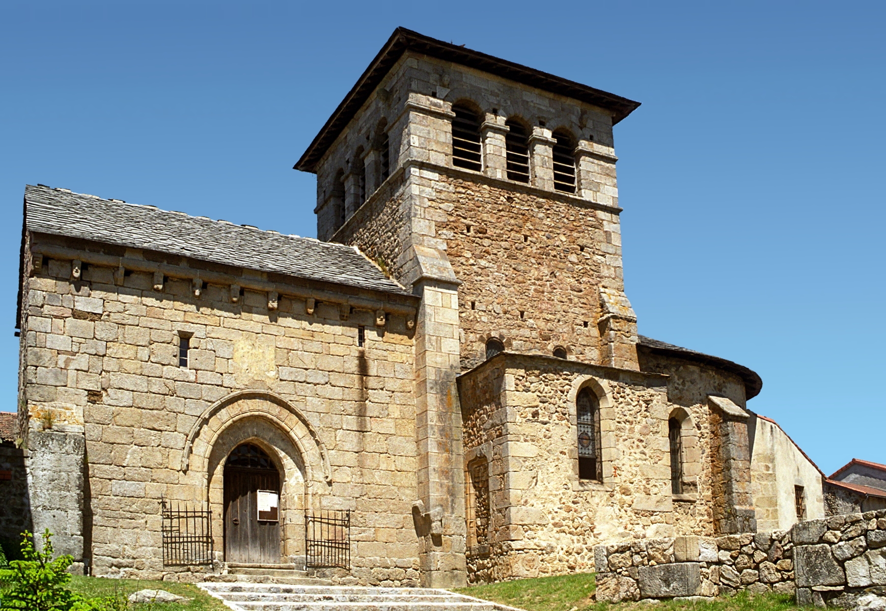 France - Auvergne - Haute-Loire - Église de Saint-Victor-sur-Arlanc